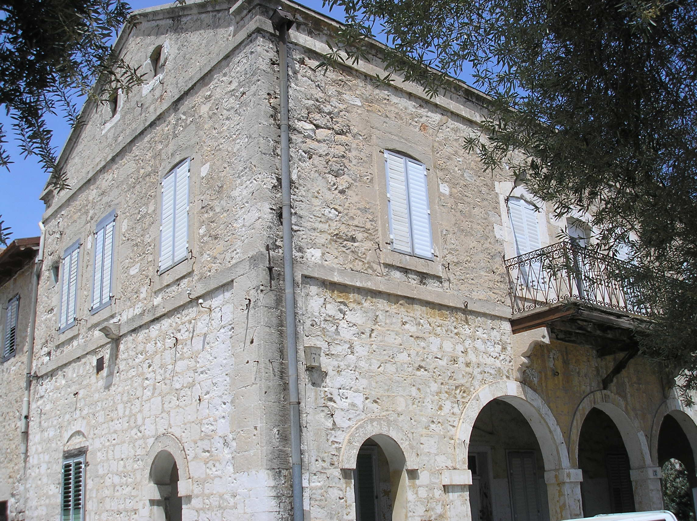 Beit Shumacher בית שומכר במושבה הגרמנית בחיפה